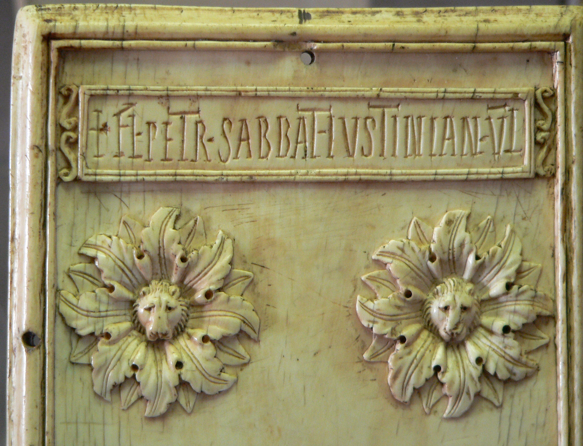 Feuillet d'un diptyque de Flavius Petrus Sabbatius Justinianus. Consul en 521, Constantinople, Ivoire d'éléphant, Ancien trésor de la cathédrale d'Autun. N.B. : Diptyque différent de celui-ci